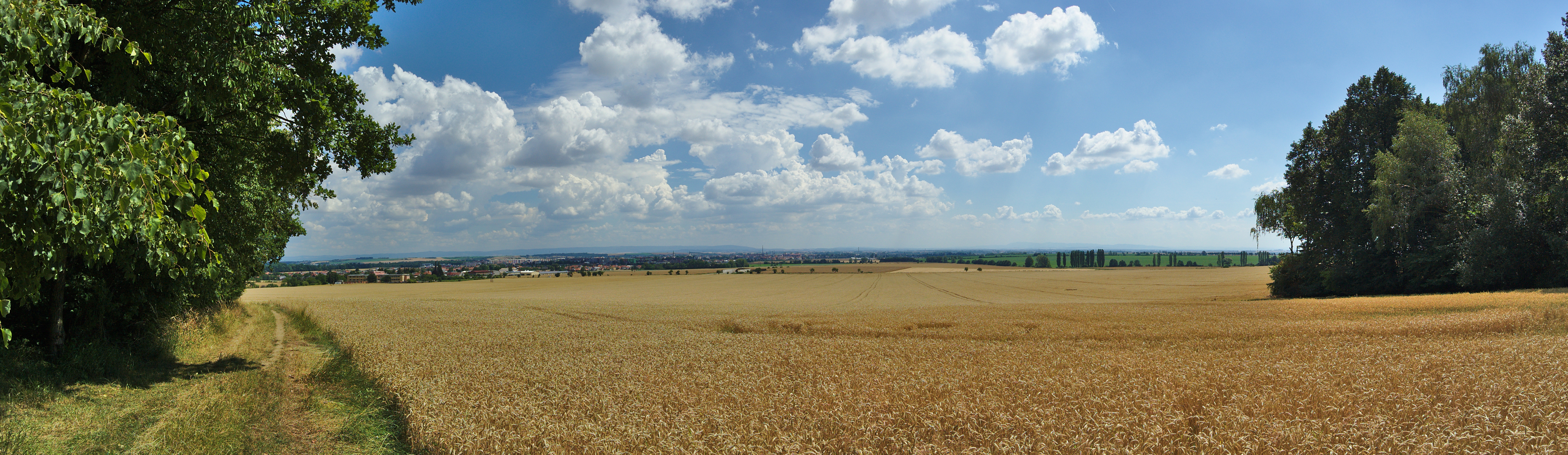 Panoramatický výhled na Prostějov z cesty mezi Domamyslicemi a PP Dolní vinohrádky